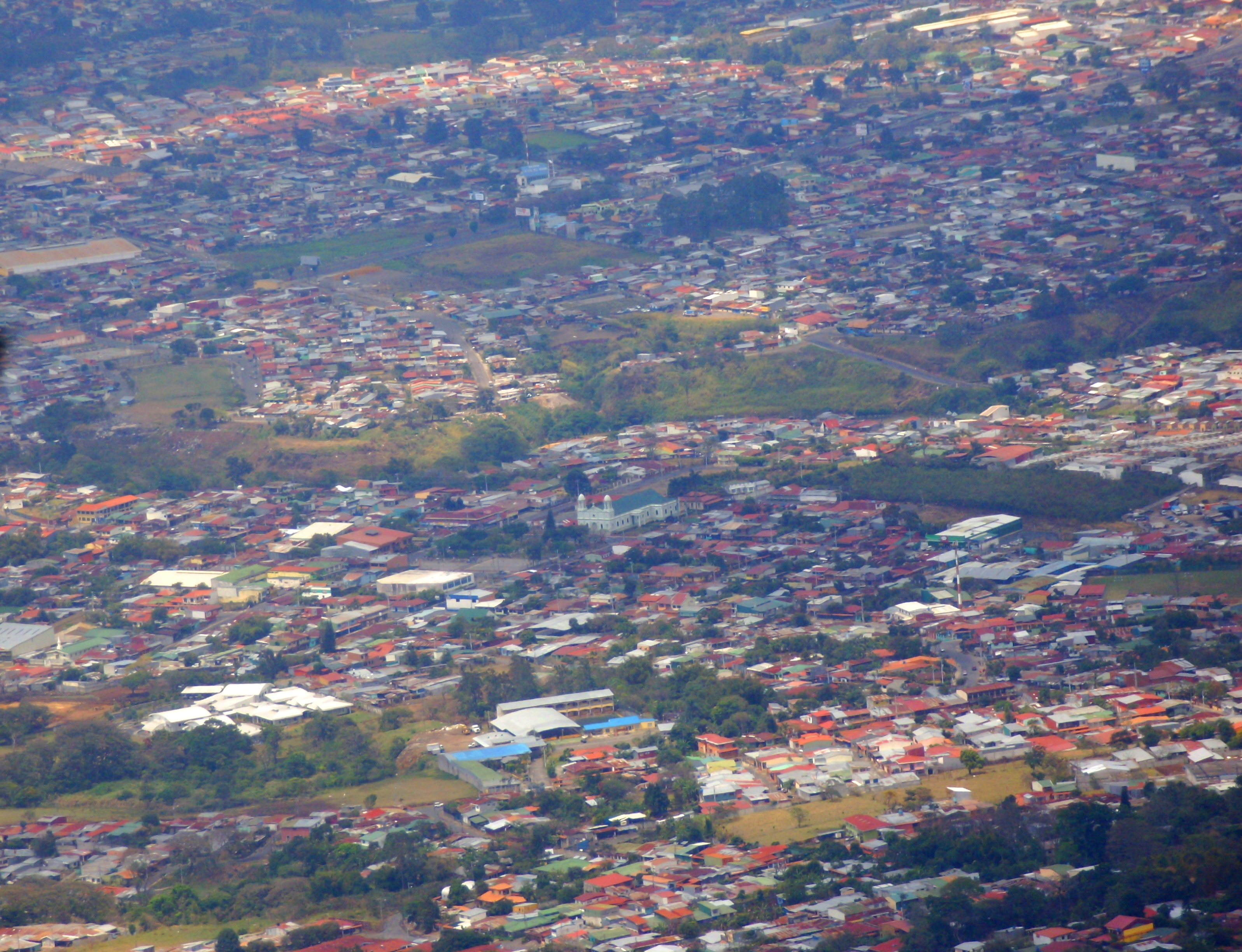 Alajuelita desde el Monte de la Cruz.